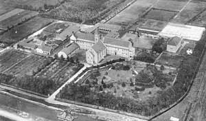 Gebäudekomplex Jugendhilfe Johannesburg ca. 1935